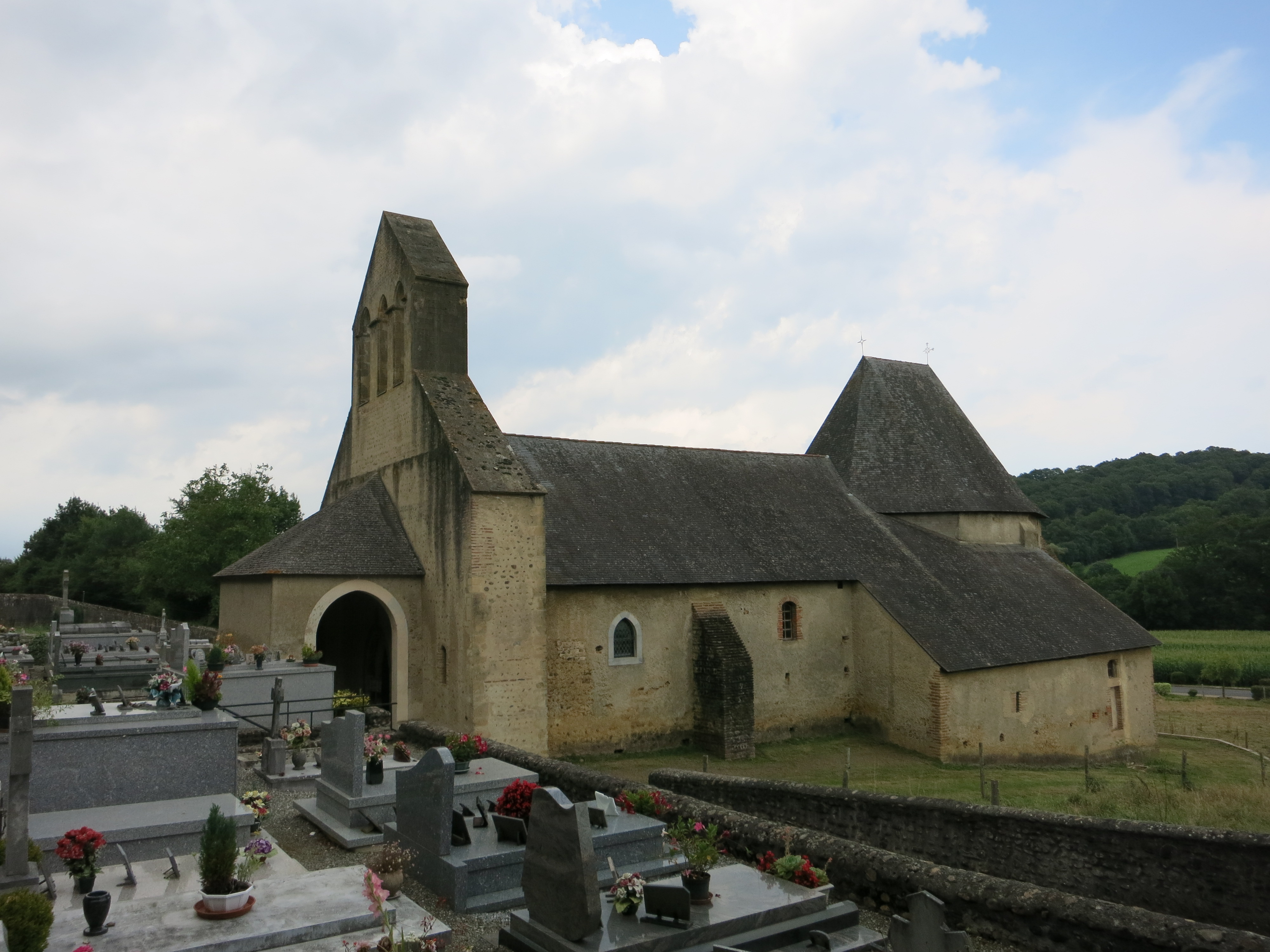 L'Église Saint-Michel de Montaner